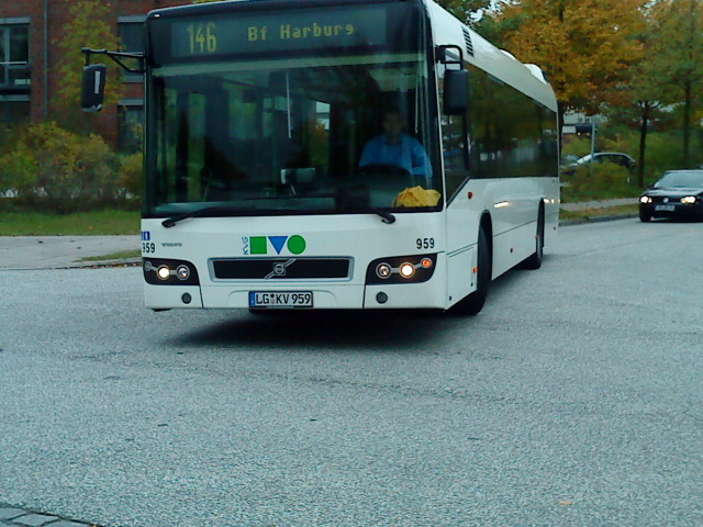 Bus der KVG (Stade) als Linie 146 nach Harburg Bhf